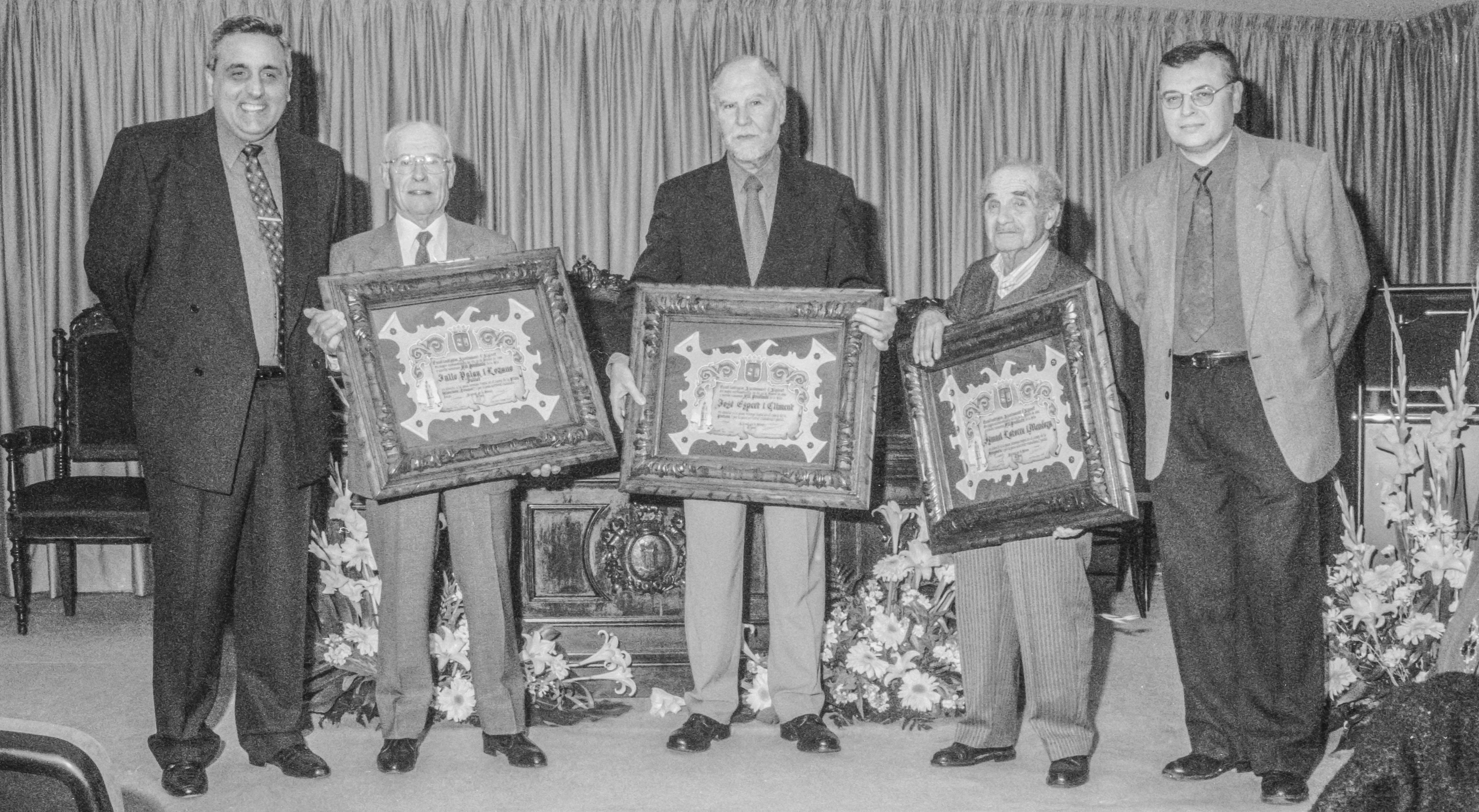 Projecte de col·laboració de l'Arxiu Ismael Latorre Mendoza amb Wikimedia Commons i Amical Wikimedia. Els fills predilectes d'Alginet: Ismael Latorre Mendoza, Julio Palau Lozano; i Antonio Alegre Cremades en representació d'en José Espert Climent; i als dos costats Alberto Soldado Hernández del periòdic Levante i Josep Lozano i Lerma (negatiu 20a, carpeta 3, amb data 26-02-1999) Fotografia publicada en: El Castell (El Periòdic d'Alginet) Publicació trimestral editada per l'Ajuntament d'Alginet, Plaça del País Valencià, 1; març 1999, núm 10. Dipòsit Legal. V-4086-1996. Imatge de portada.